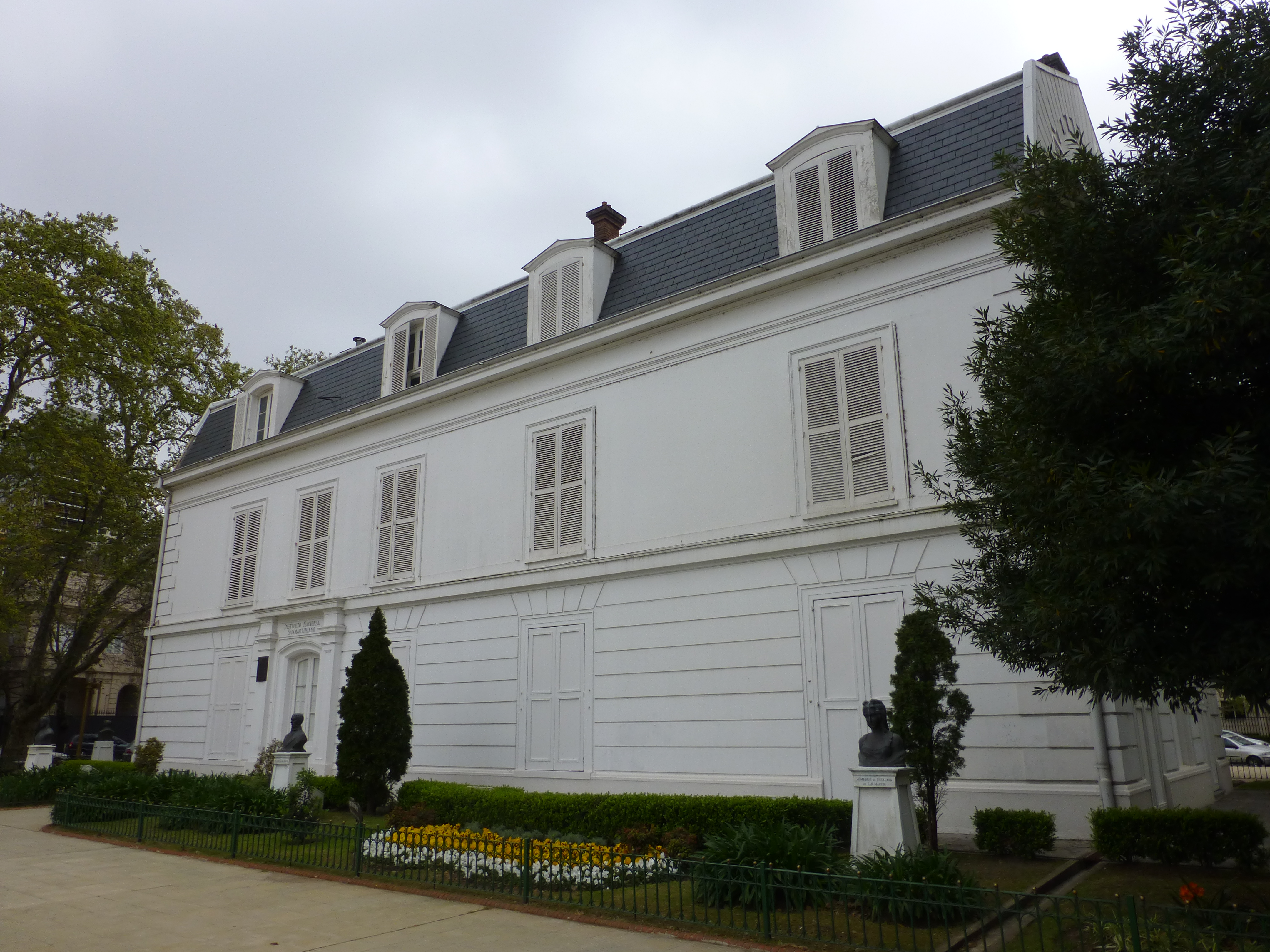 Vista del Instituto Nacional Sanmartiniano, ubicado en el barrio porteño de Palermo.